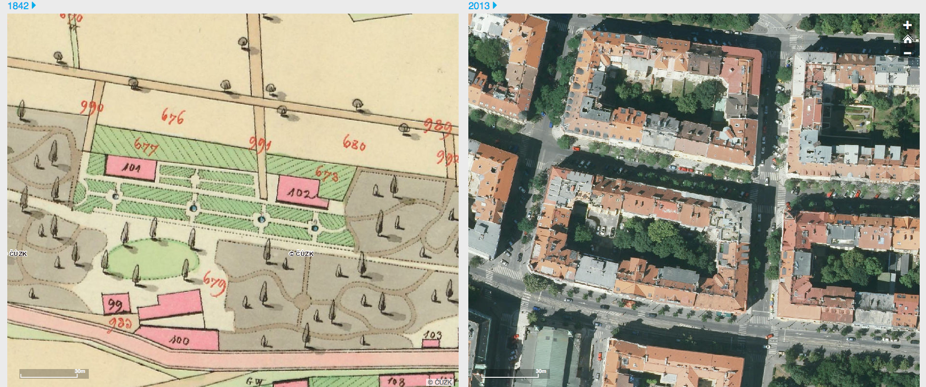 Vinohrady v roce 1842 a 2013